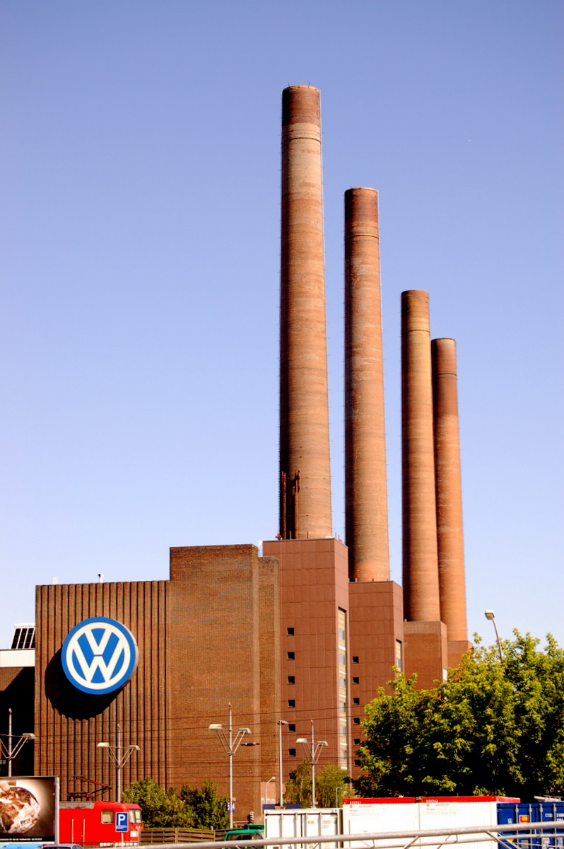 Volkswagen-Logo, Kraftwerk, Wolfsburg, VW